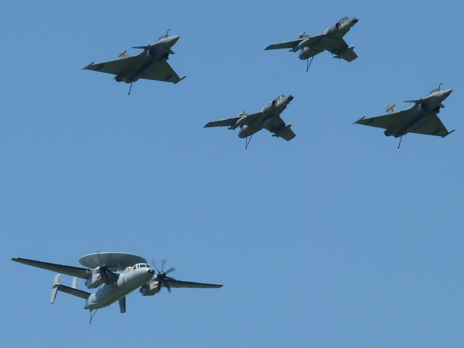 Les 100 ans de l'aéronautique navale française célébrés dans le ciel de la Ferté-Alais le 23 mai 2010: deux Super Etandards encadrés par deux Rafale Marine et un Grumman E-2 Hawkeye pour fermer la marche.